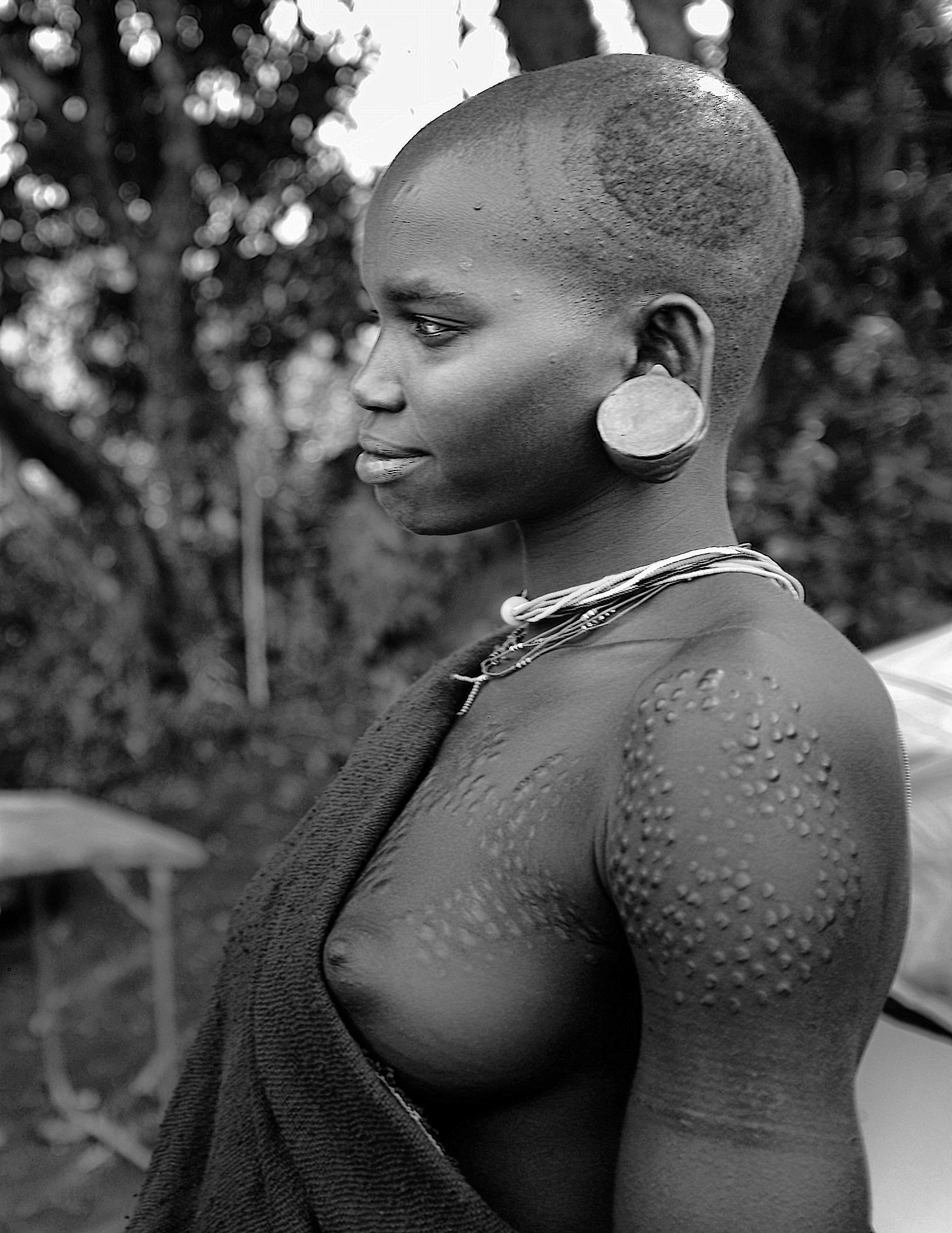 Omo Valley, Ethiopia